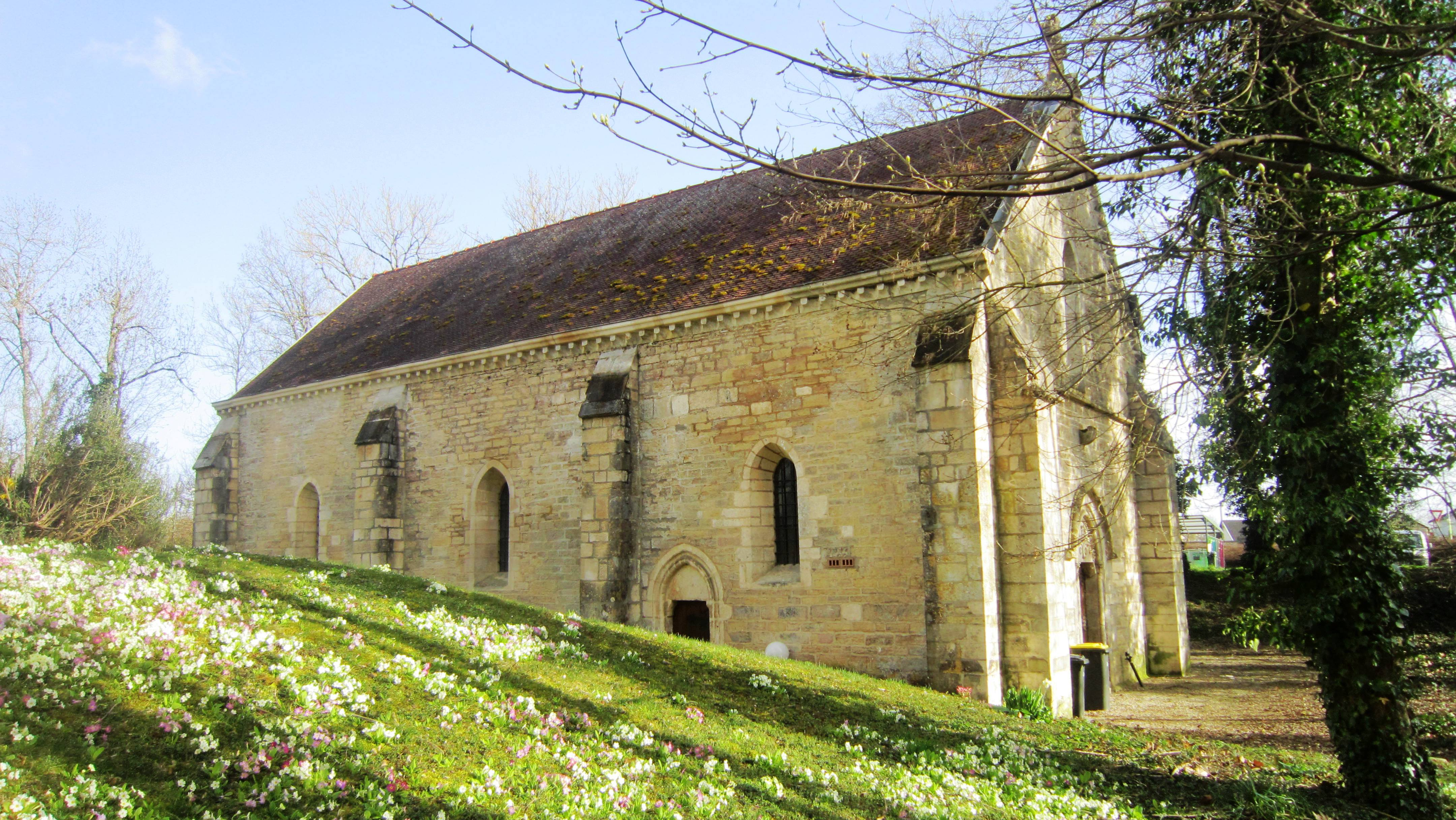 Vestige d'une commanderie de Templiers à Châtillon-sur-Seine (Côte-d'Or)